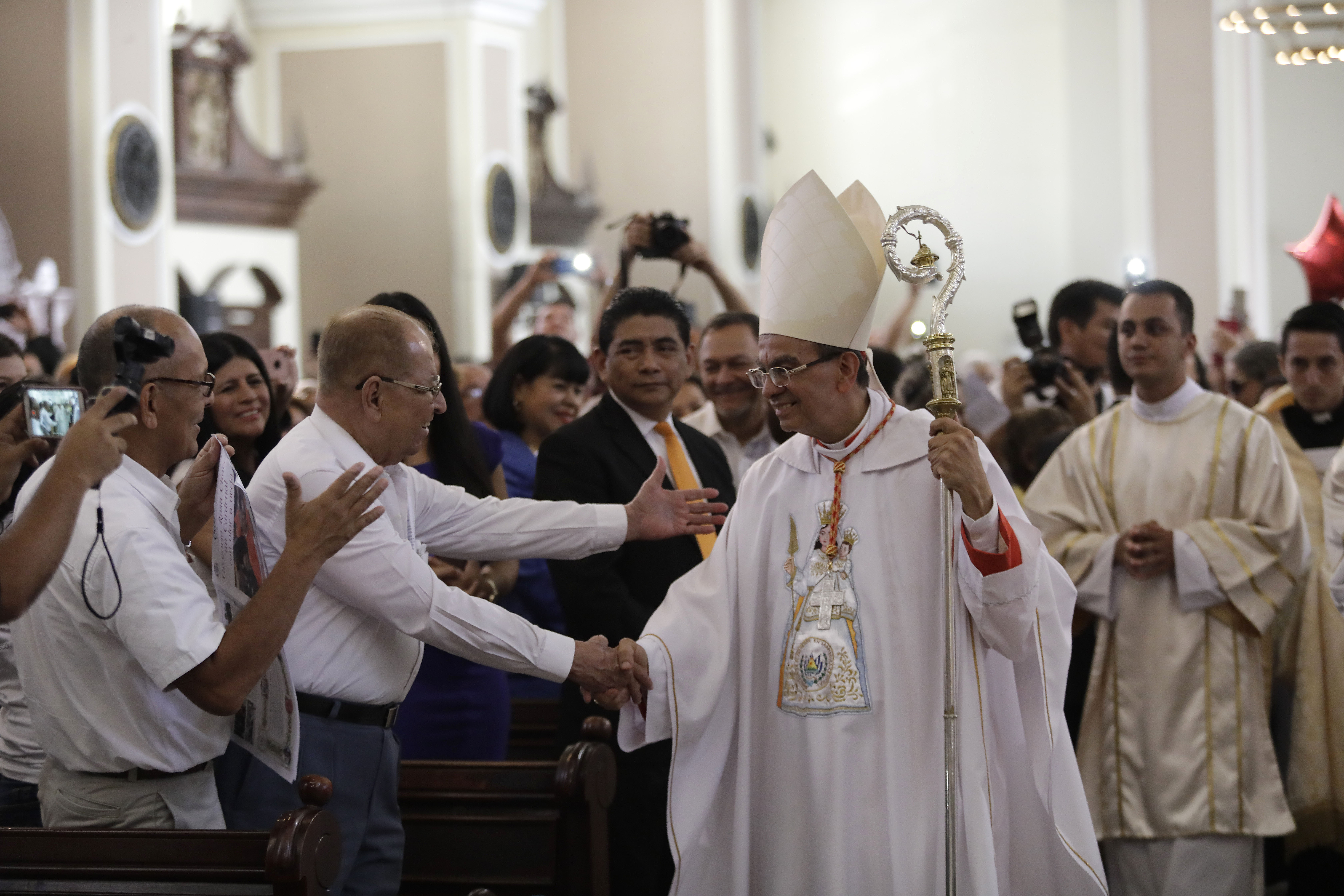 Misa Cardenal Gregorio Rosa Chávez.